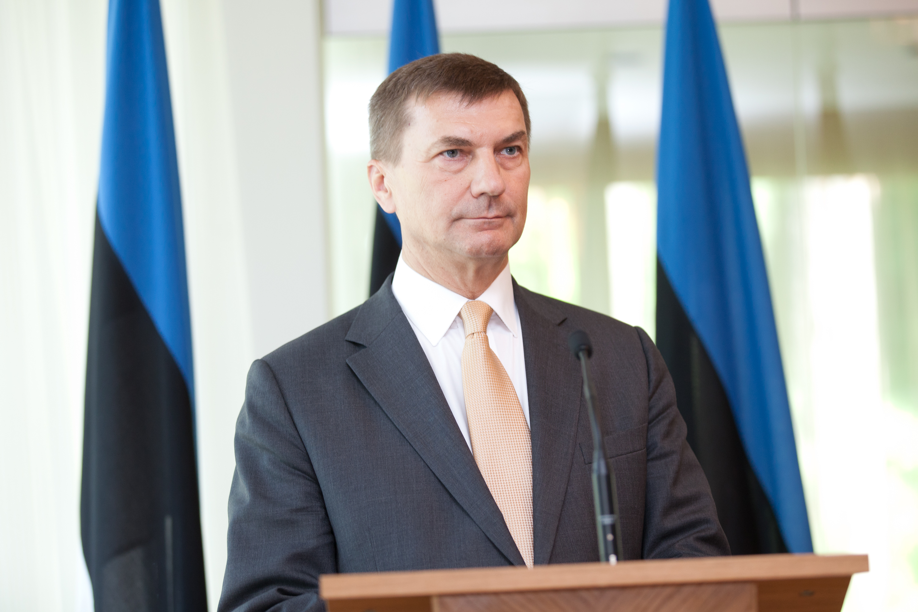 Igaunijas Republikas premjerministrs Andrus Ansips